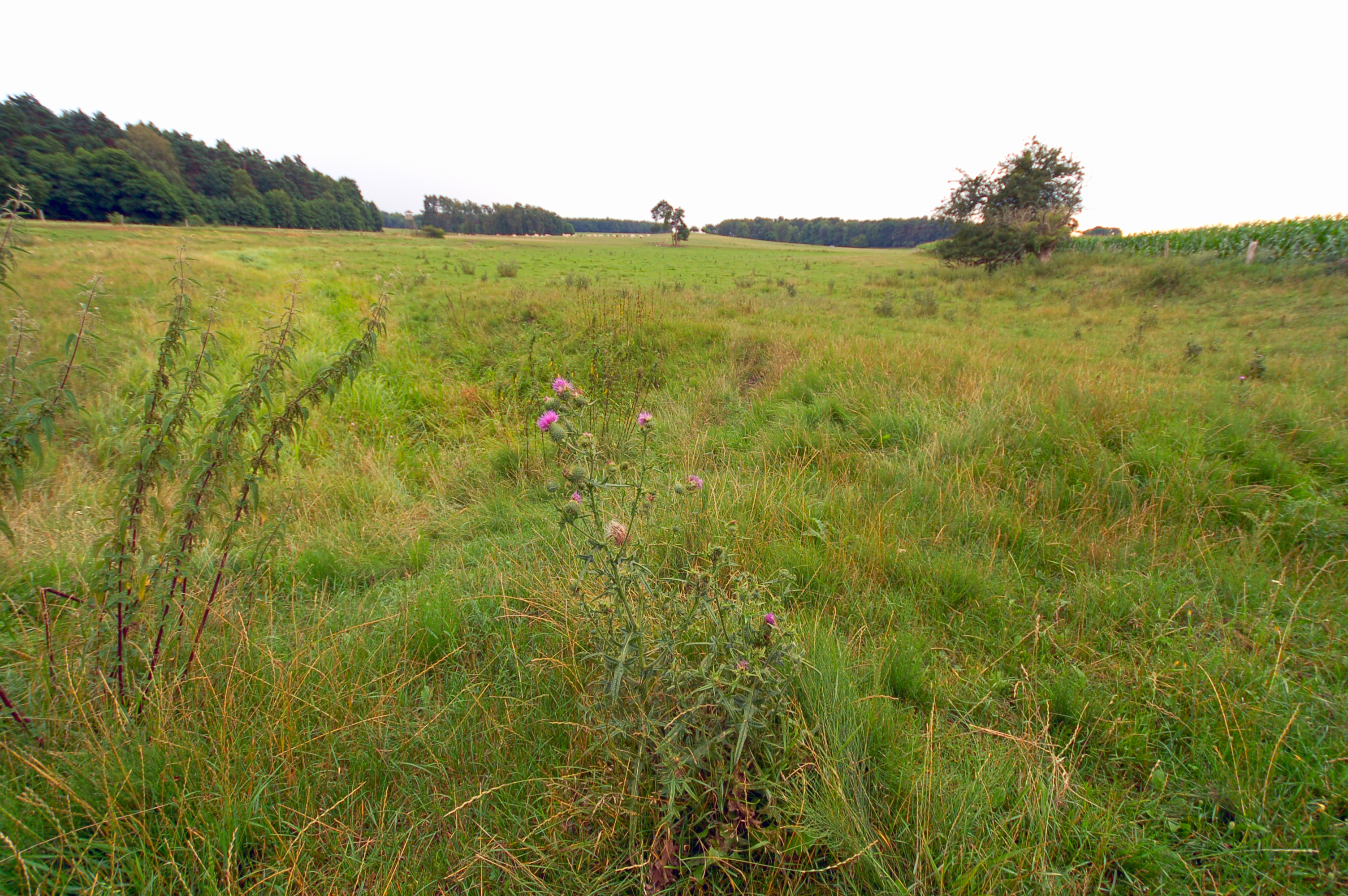 Golzow ist ein Dorf im Landkreis Barim (Brandenburg) und gehört zur Gemeinde Chorin; Quellgebiet der Ragöse